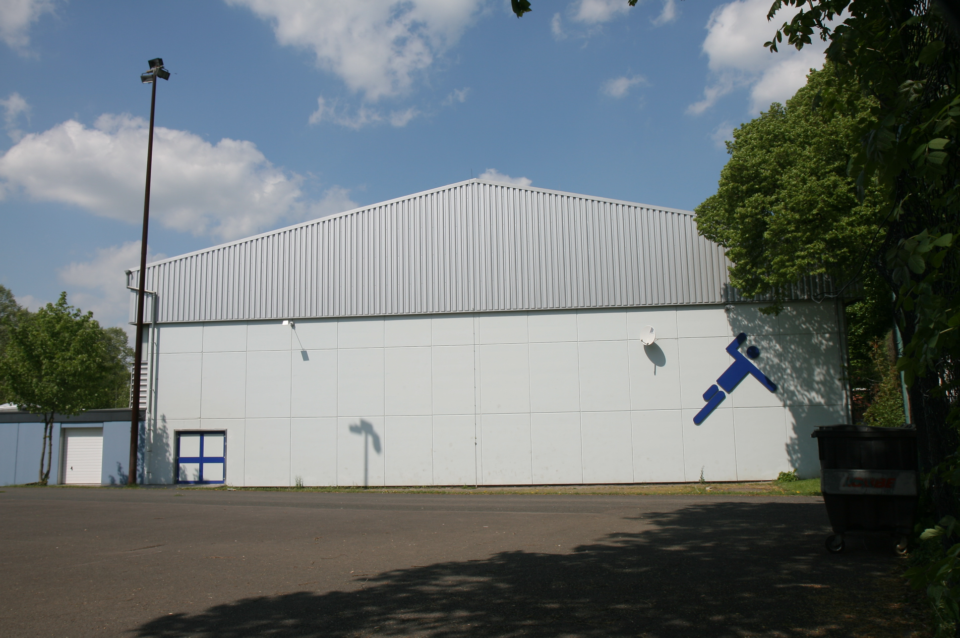 Sporthalle Walram-Gymnasium in Menden, Walramstraße 4. Die Größe der Halle beträgt bei einer Höhe von 7,10 Meter 27 Meter Breite und 45 Meter Länge. Die Zuschauerkapazität liegt bei 640 Plätzen.